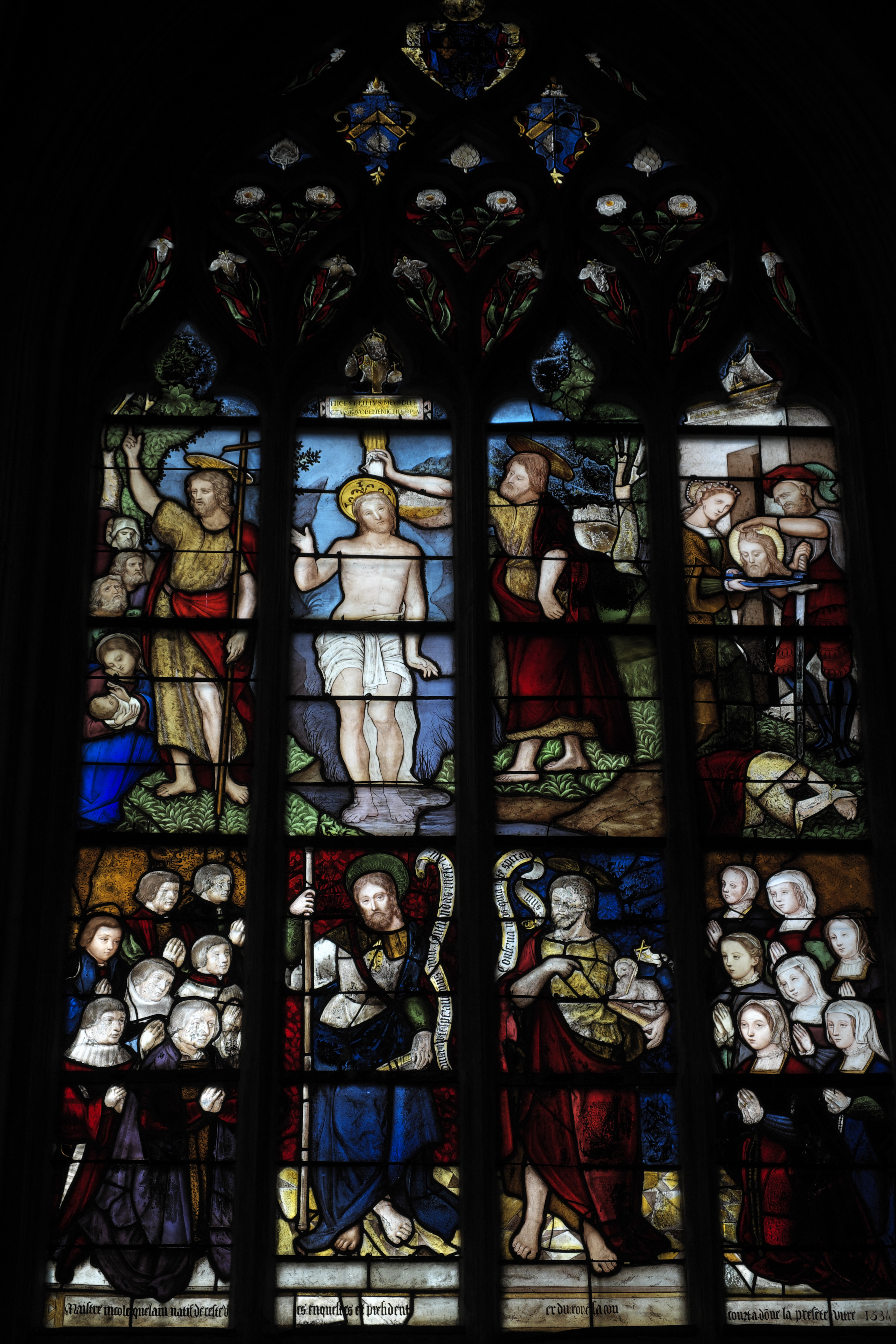 Katholische Pfarrkirche Notre-Dame-des-Marais in La Ferté-Bernard im Département Sarthe (Pays de la Loire/Frankreich), Bleiglasfenster von 1534; Darstellung: Szenen aus dem Leben von Johannes dem Täufer, Stifter